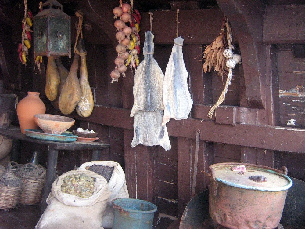 Bodegas de una carabela en el Muelle de las Carabelas